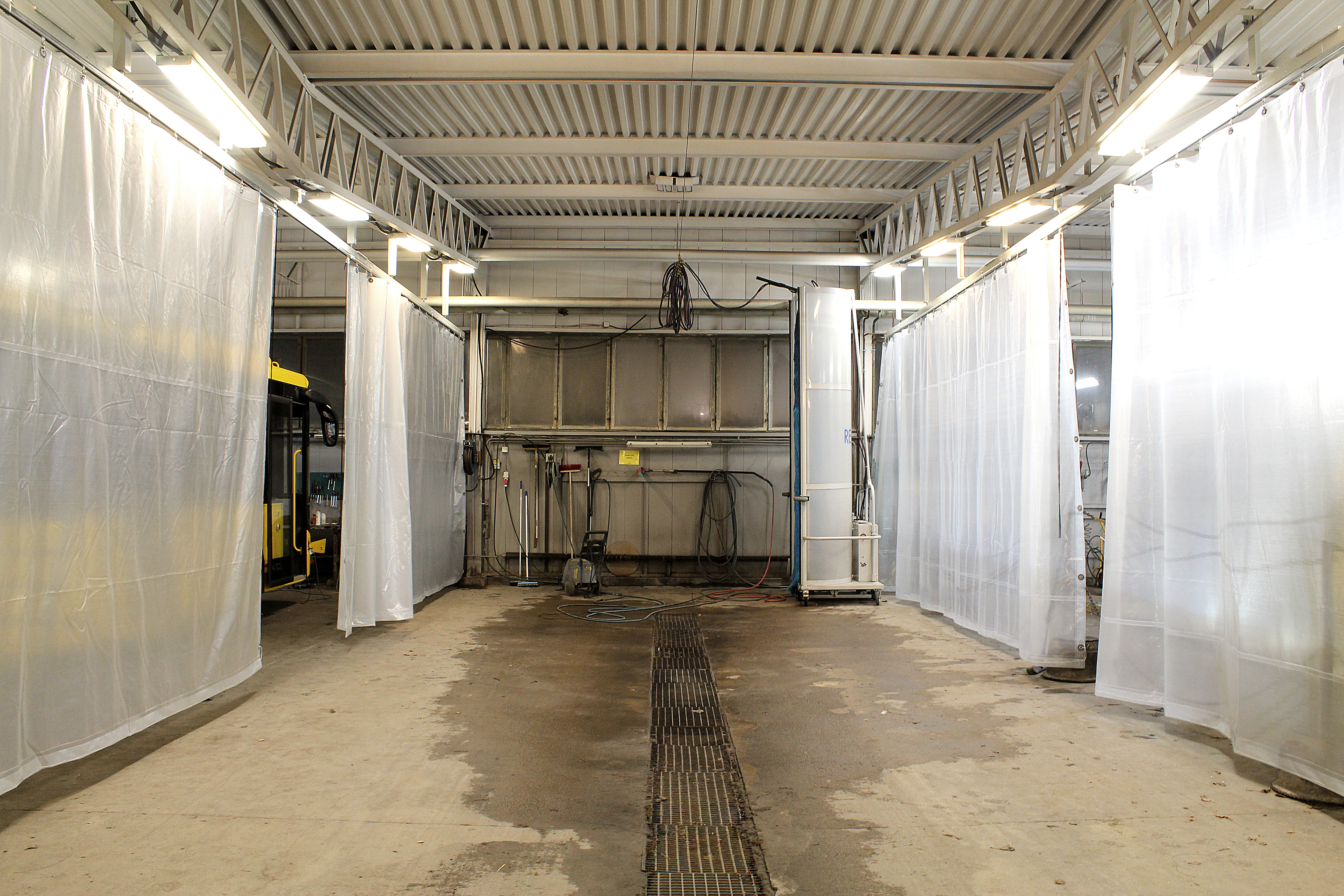 Kraftiga PVC-draperier i en tvätthall för bussar.